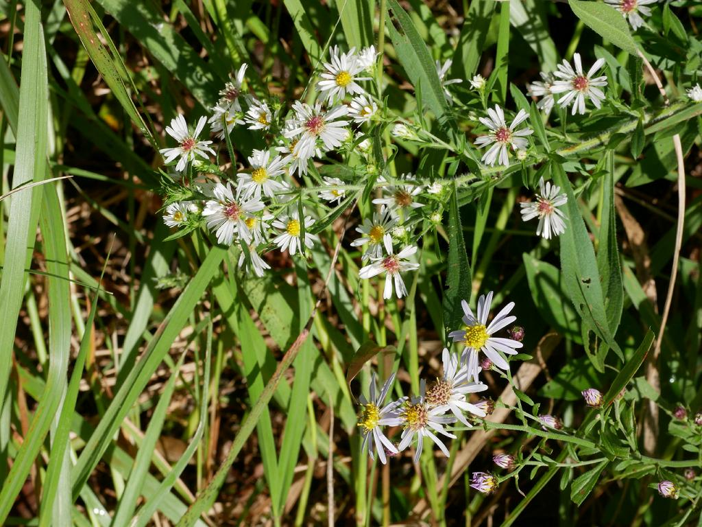 2019/10/25 和歌山県田辺市：Tanabe City. Wakayama Pref. Japan